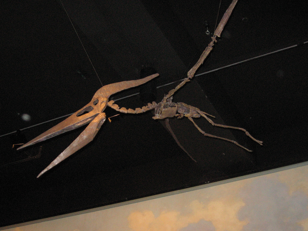 Pteranodon.